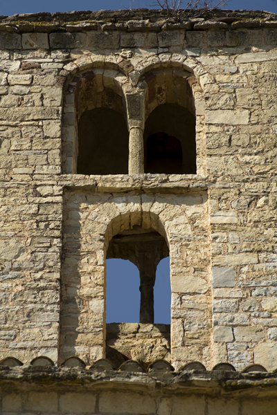 Cervelló